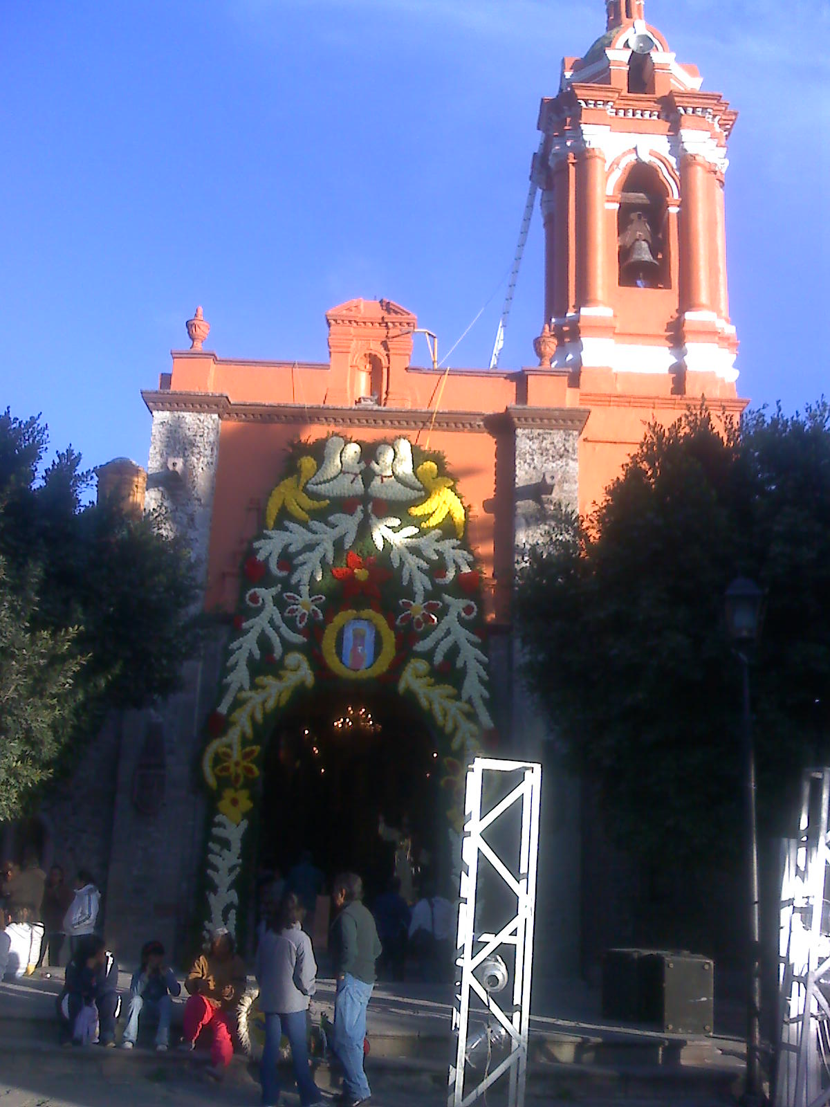 iglesia